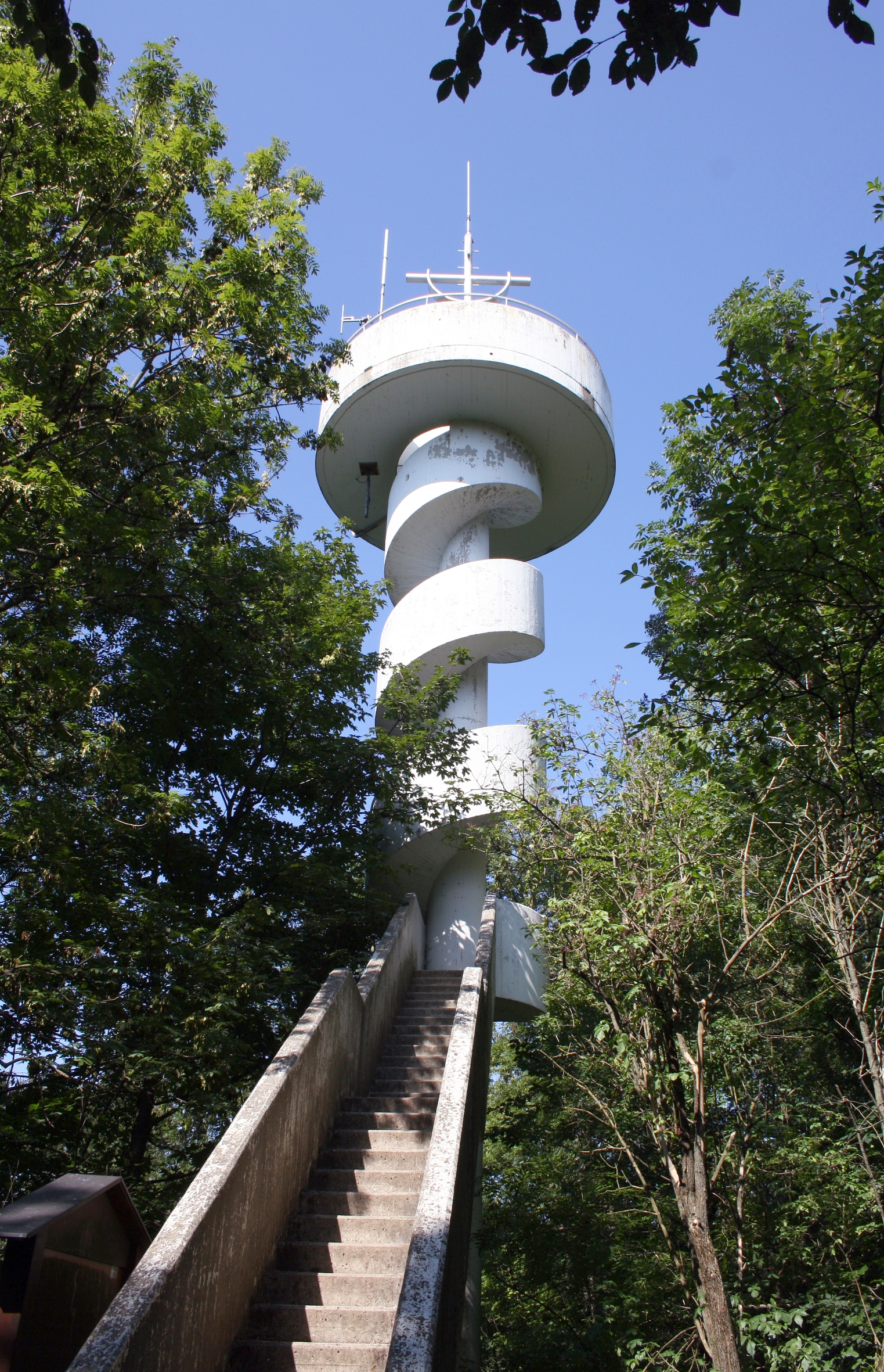 Die Leopold-Figl-Warte auf dem 494 m hohen Tulbinger Kogel in der niederösterreichischen Marktgemeinde Tulbing. Die nach dem österr. Bundeskanzler Leopold Figl benannte Aussichtswarte wurde nach einem Entwurf von Clemens Holzmeister 1966/67 errichtet.